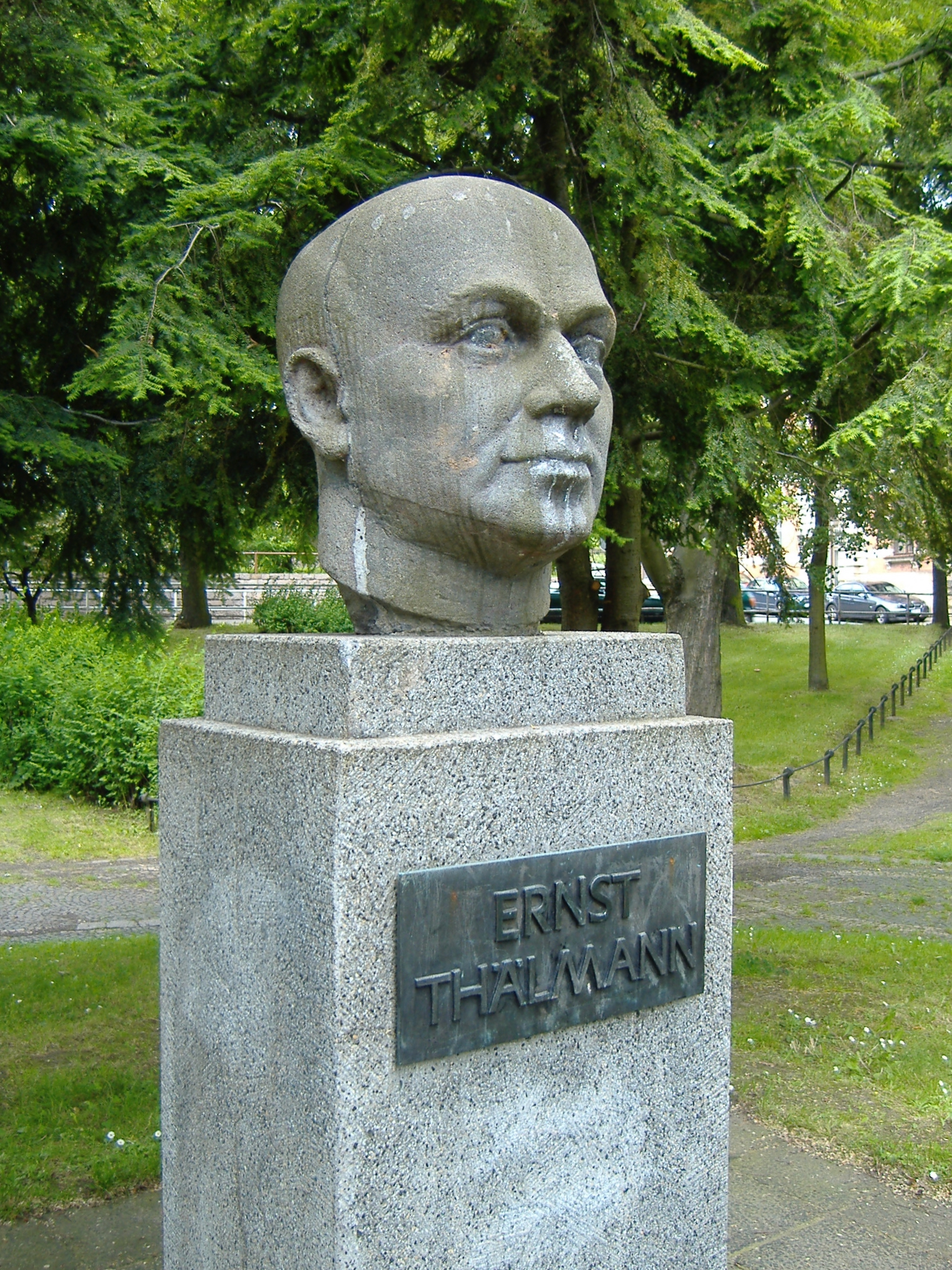 Ernst Thälmann Denkmal in Werdau.